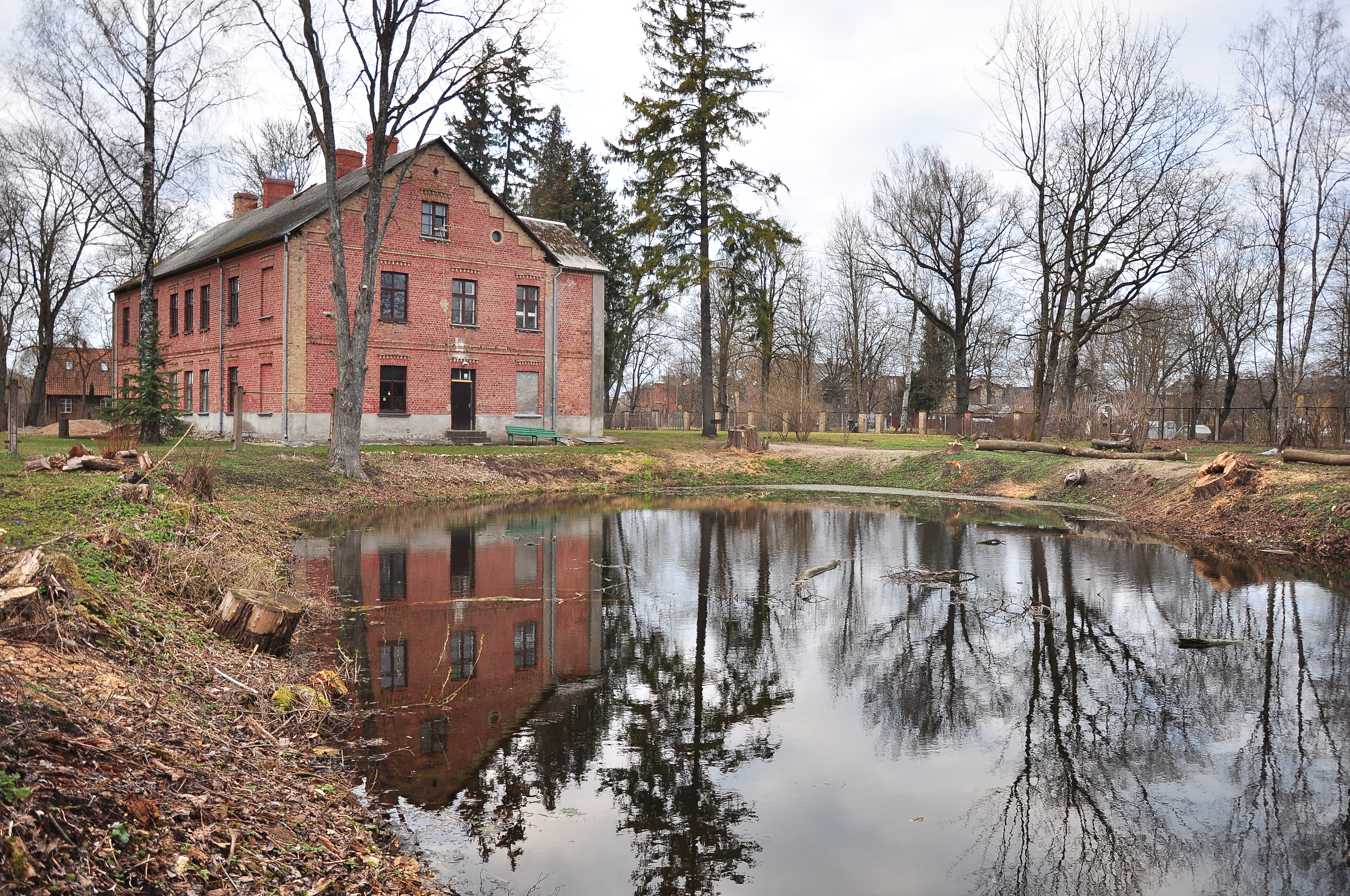 Ģintermuižas slimnīcas vēsturiskā apbūve